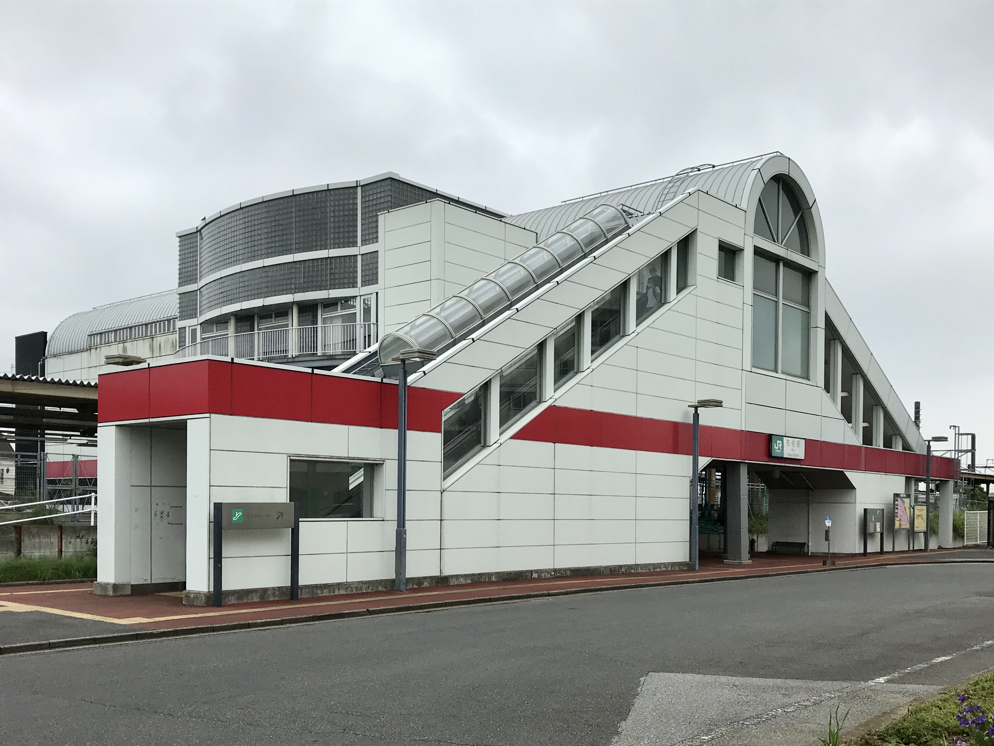 布佐駅南口